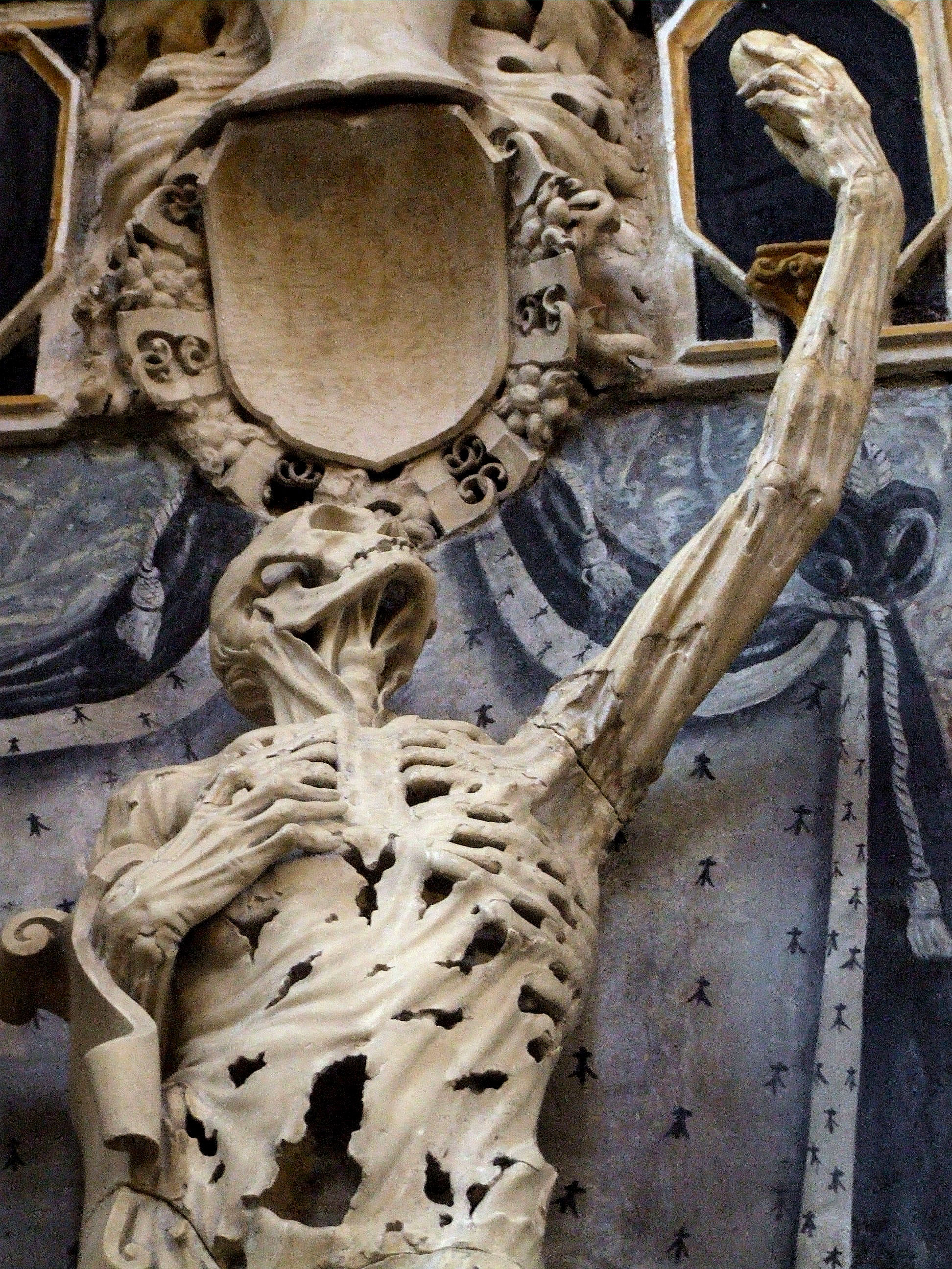 Bar-le-Duc - Eglise Saint-Etienne - Le Transi